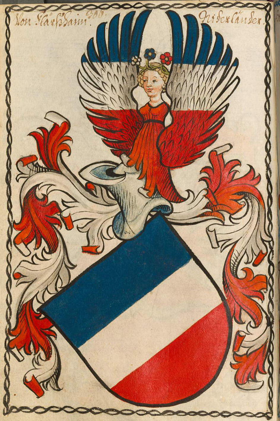 Scheibler'sches Wappenbuch , älterer Teil; Seite 306 Von Flärßhaim Niederländer